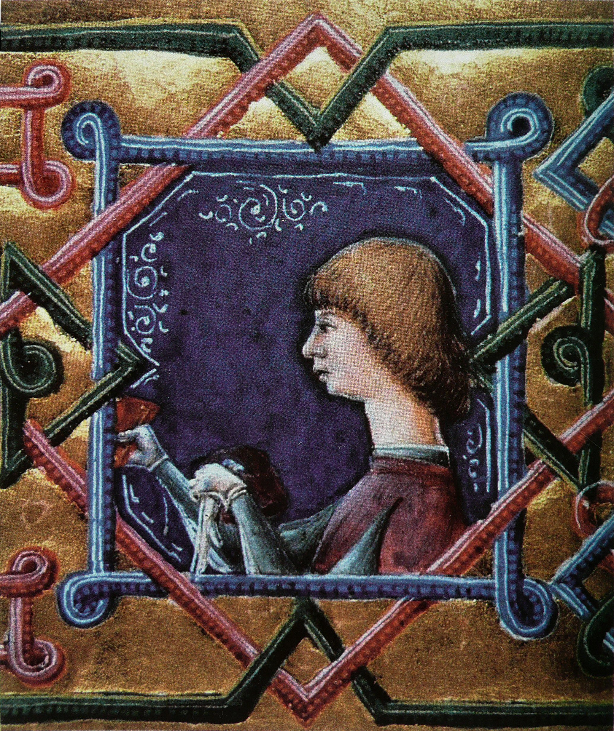 Portrait de Matthias Corvinus. Frontispice d'un manuscrit (Plaute, Comédies)